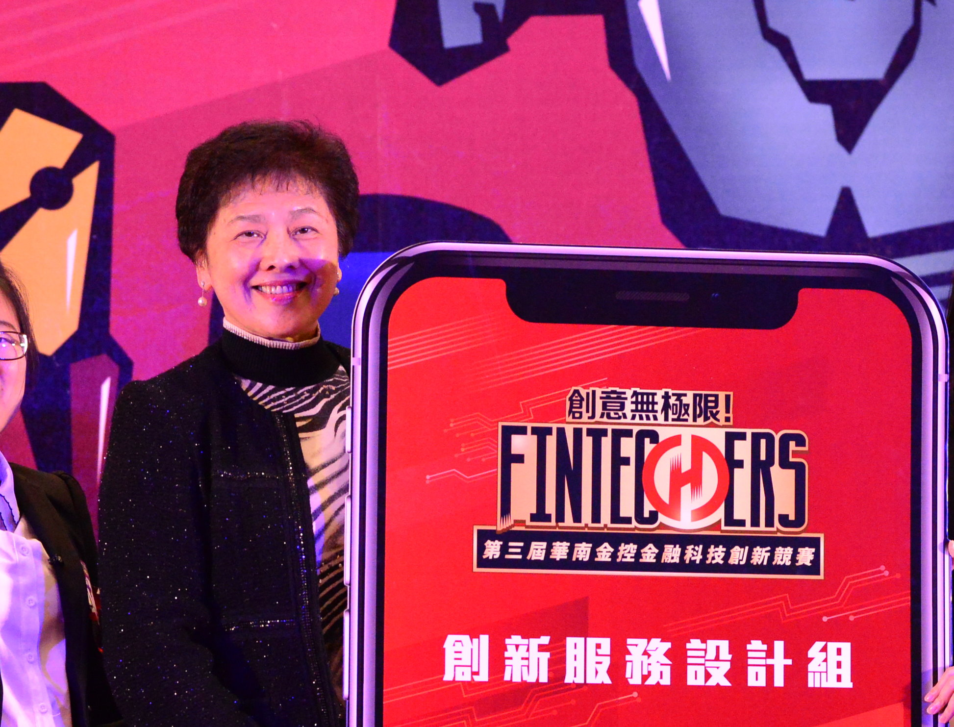 羅寶珠之半身照